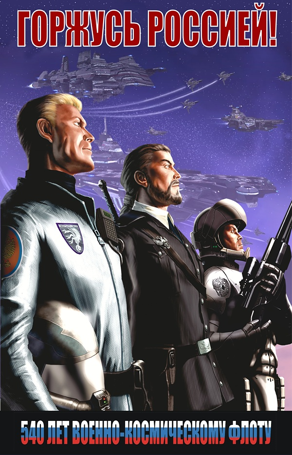 Пропагандистский плакат — иллюстрация к циклу фанстастических романов Александра Зорича «Сфера Великорасы», известному также как «Вселенная "Завтра война"»